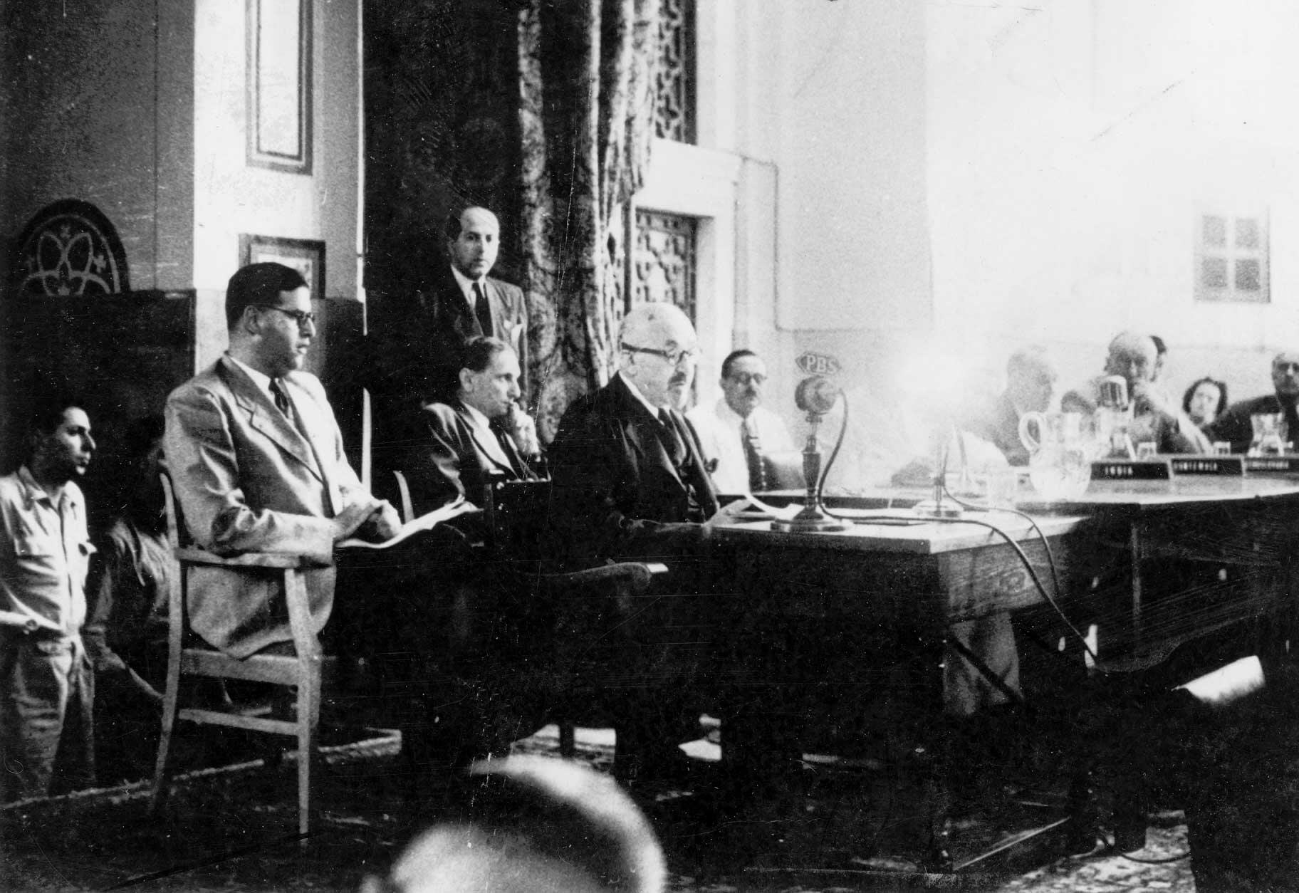 פרופסור וייצמן חיים מוסר עדות בפני ועדת האו"ם אונסקו"פ